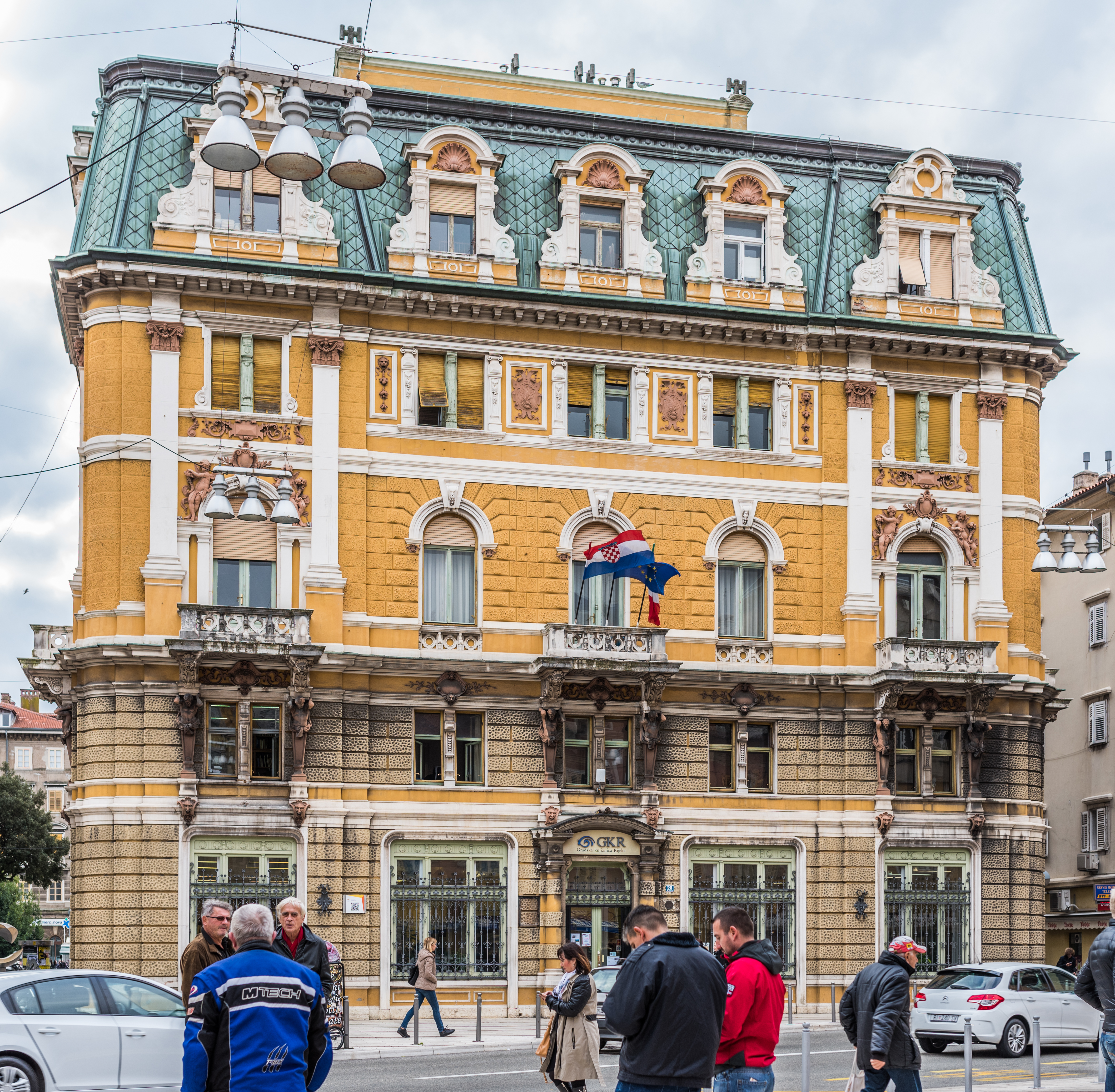 Rijeka Croatia November 2017